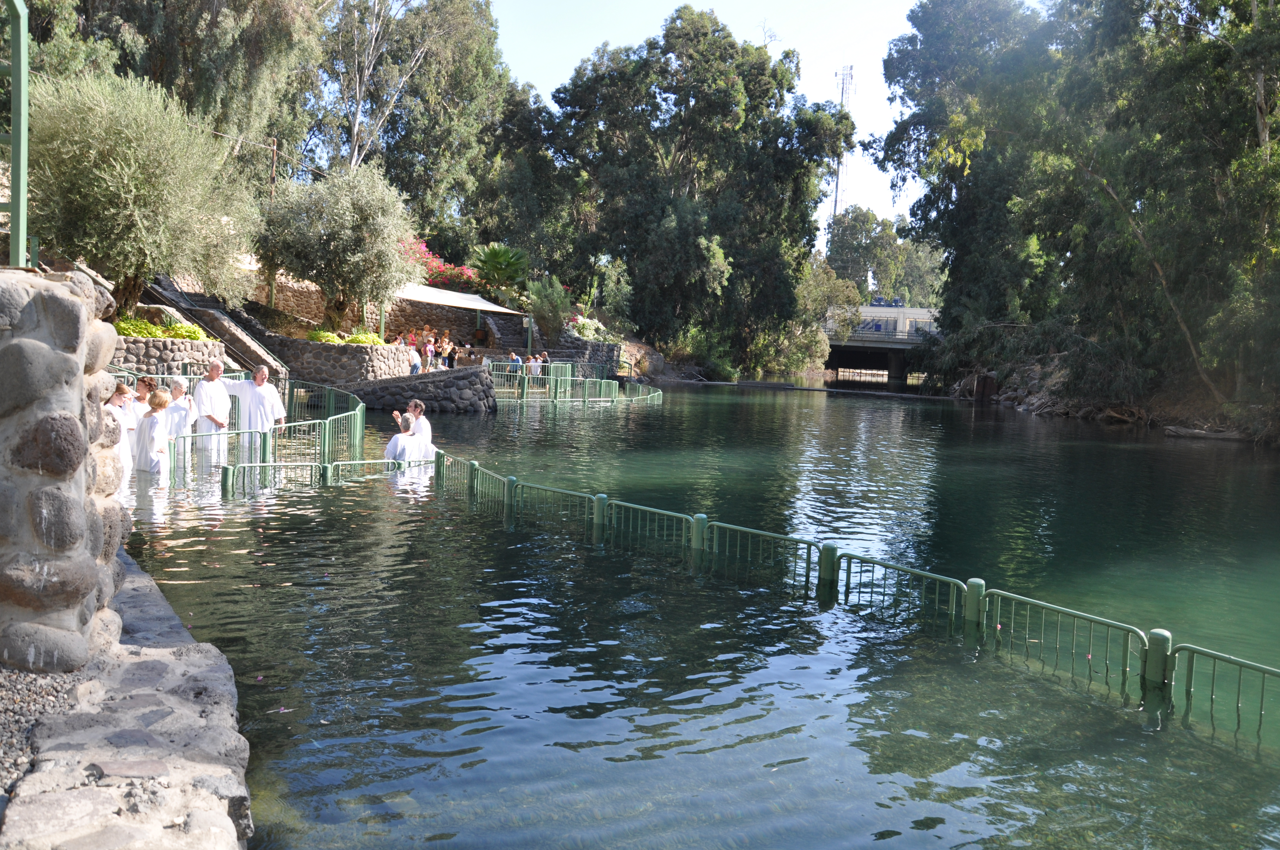 Doopplechtigheid bij Jardenit, Jordaan, oktober 2010Unknown